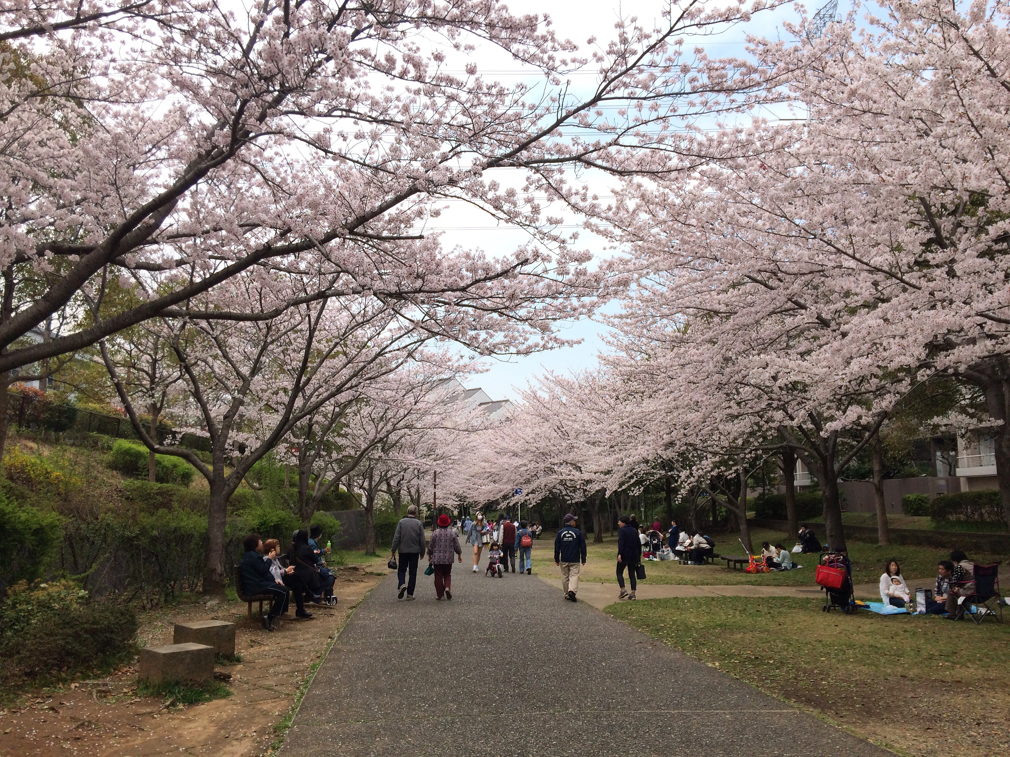 おゆみ野春の道の景色